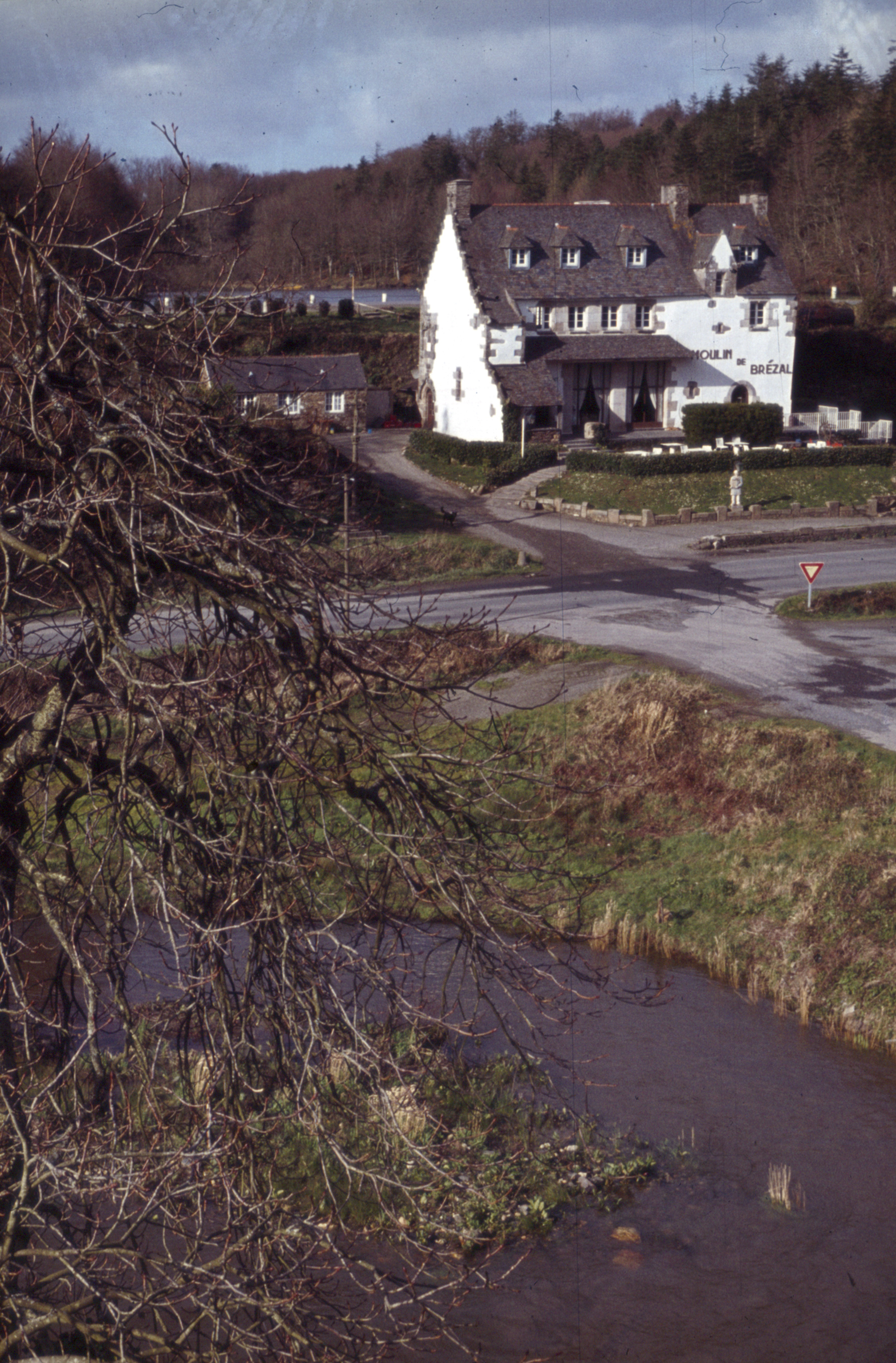 Plounéventer